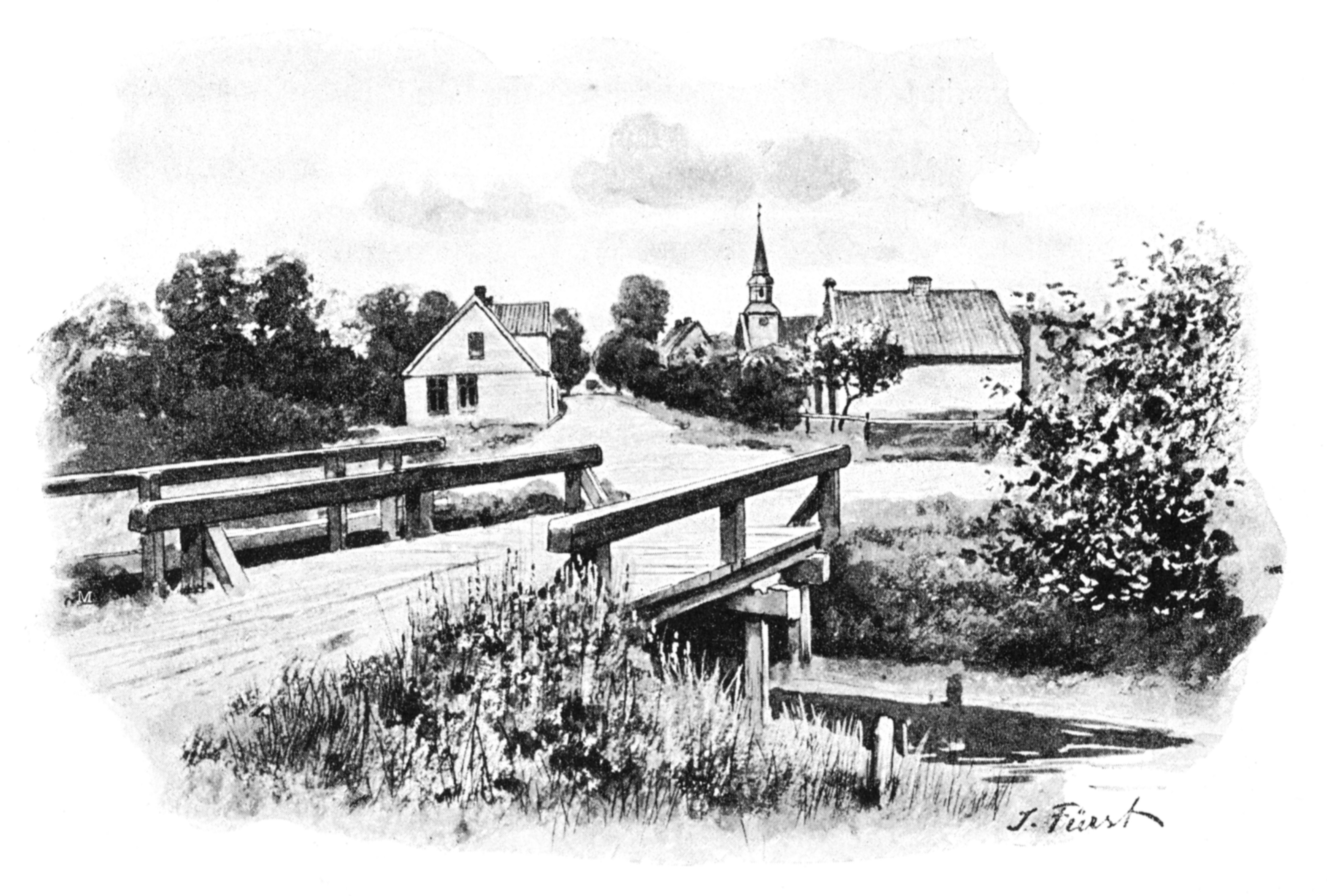 Brunsbüttel um 1895, Zeichnung von Julius Fürst